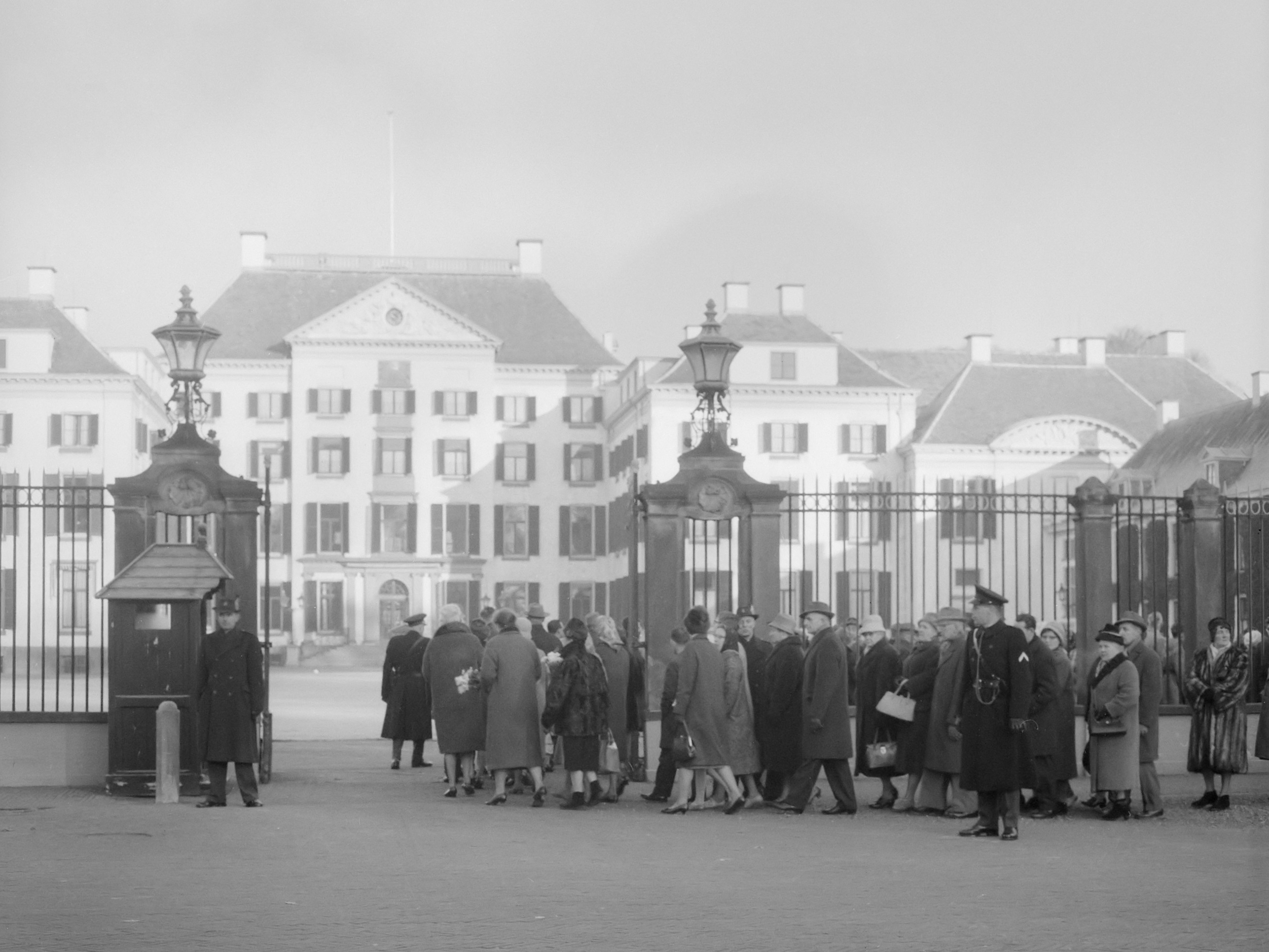 Apeldoorn, paleis Het Loo. Laatste eer aan prinses Wilhelmina: publiek passeert de hekken van het paleis 30 november 1962